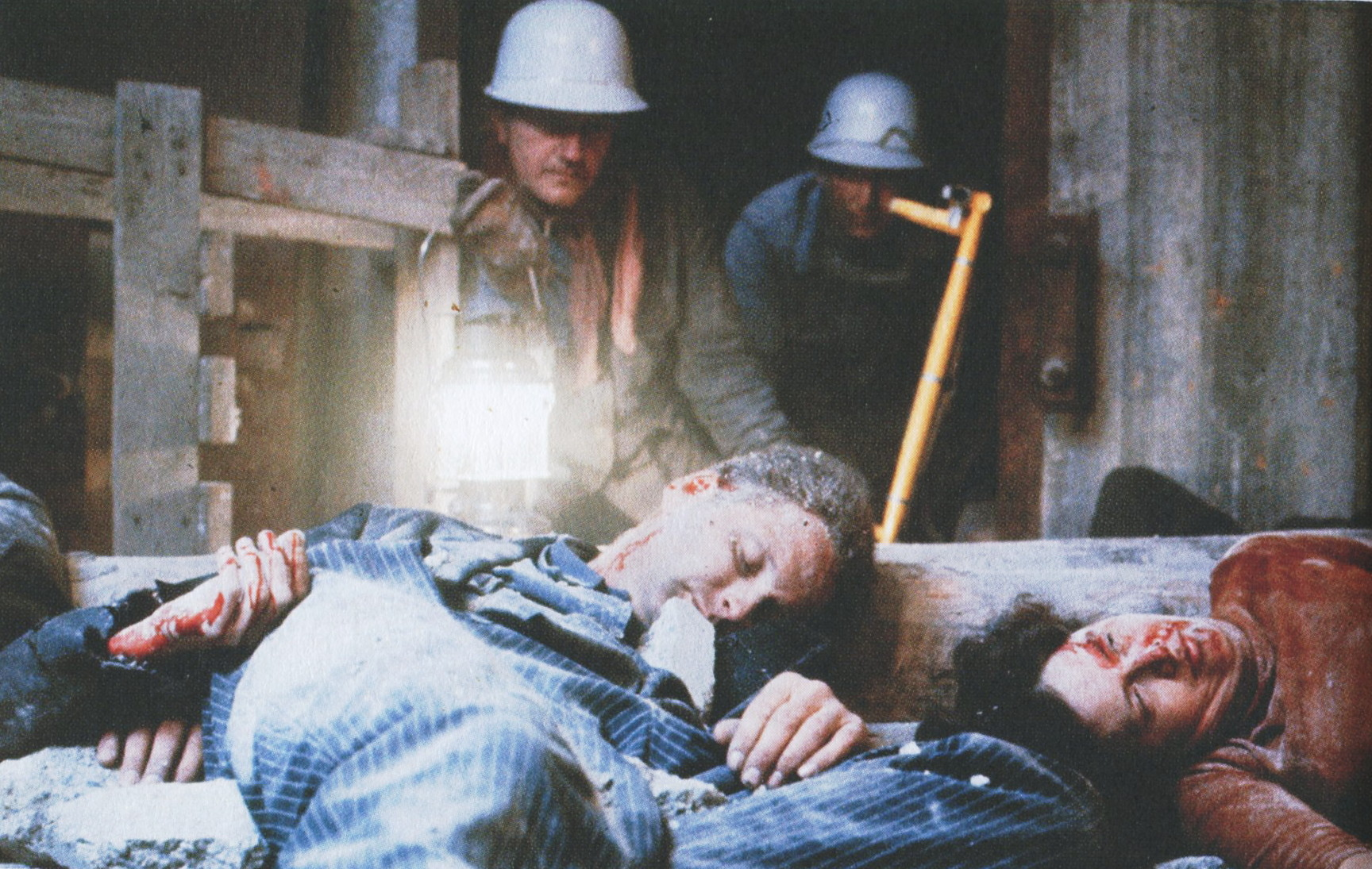 Civilförsvarsövning, räddning av sårade, troligen fotograferat i en av Civilförsvarsförbundets skolor.